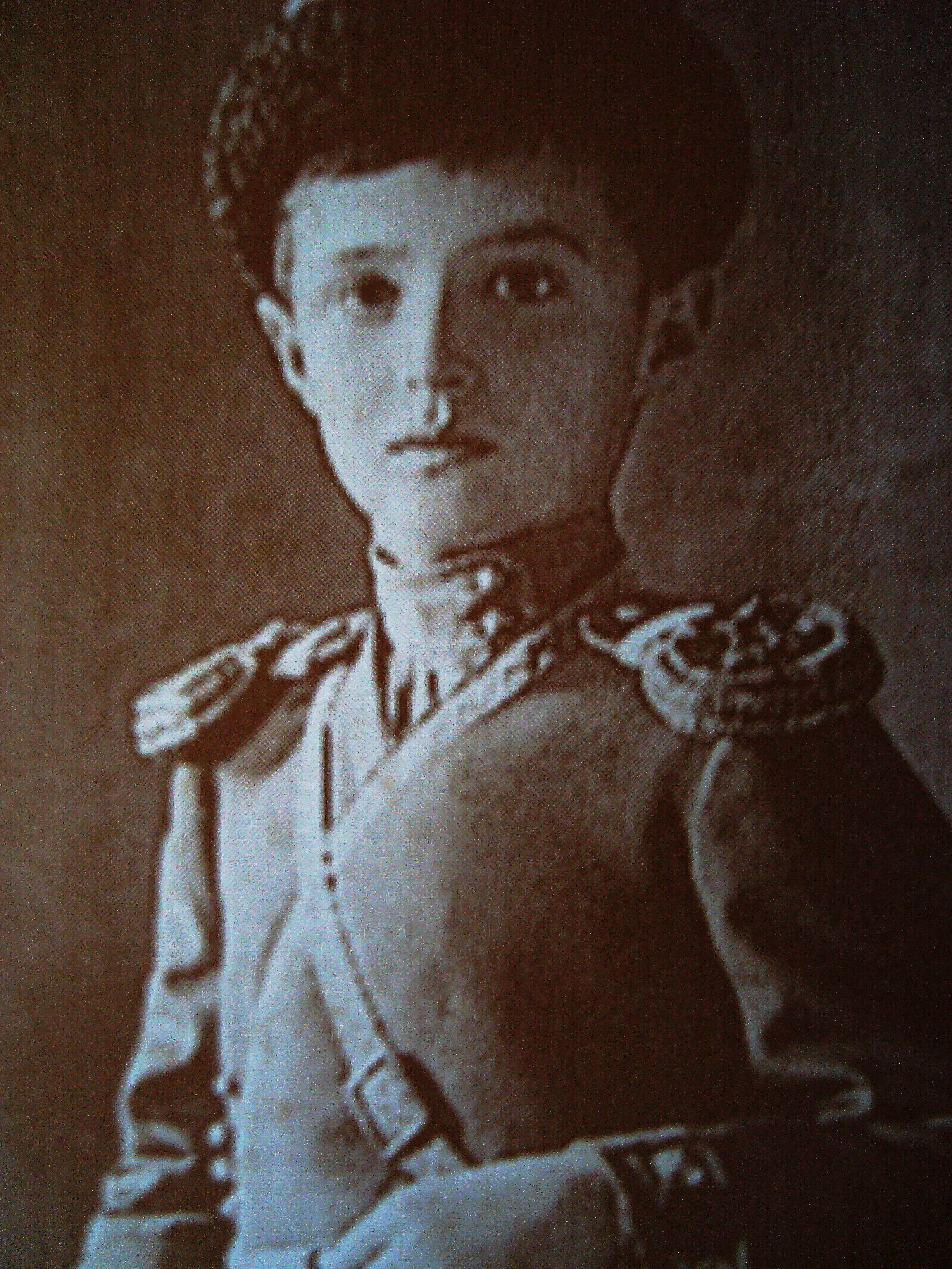 Carewicz Aleksy Romanow, syn Mikołaja II i Alicji Heskiej.